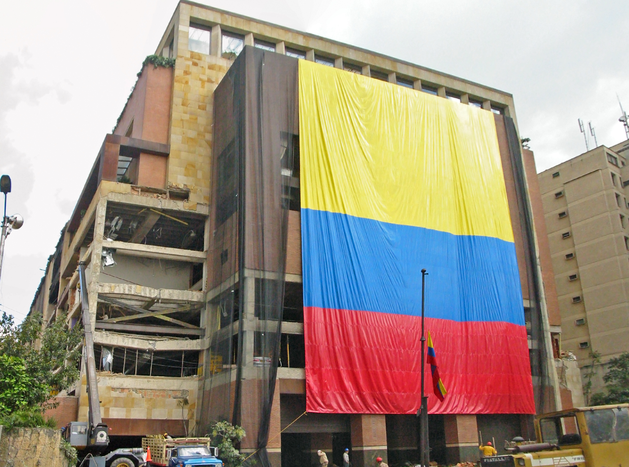 Reconstrucción del club social El Nogal después de sufrir un atentado terrorista el 7 febrero de 2003, presuntamente perpetrado por la guerrilla de las FARC